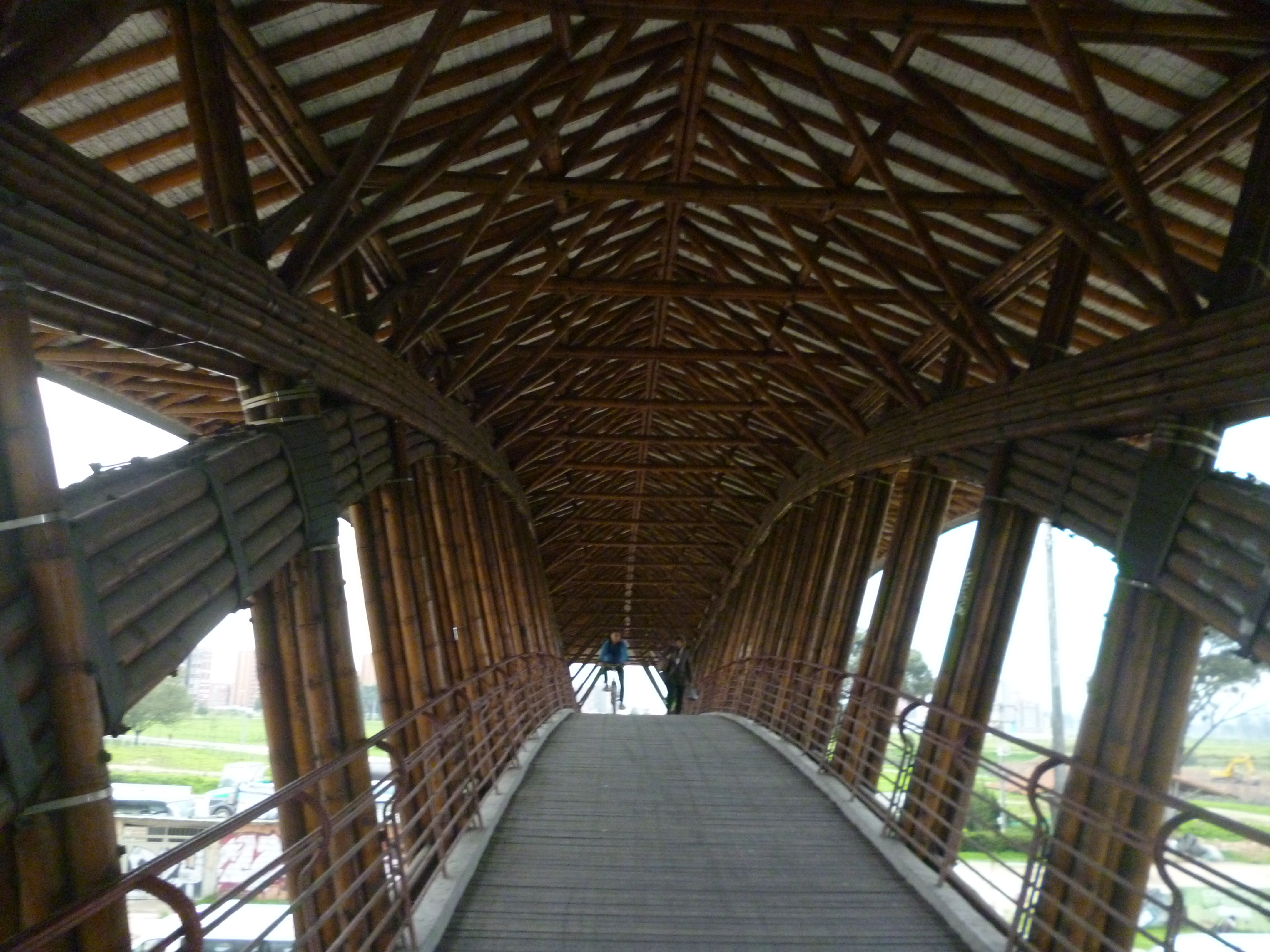 Hecho en Guadua.